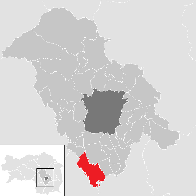 Lage von Dobl-Zwaring im Bezirk Graz-Umgebung